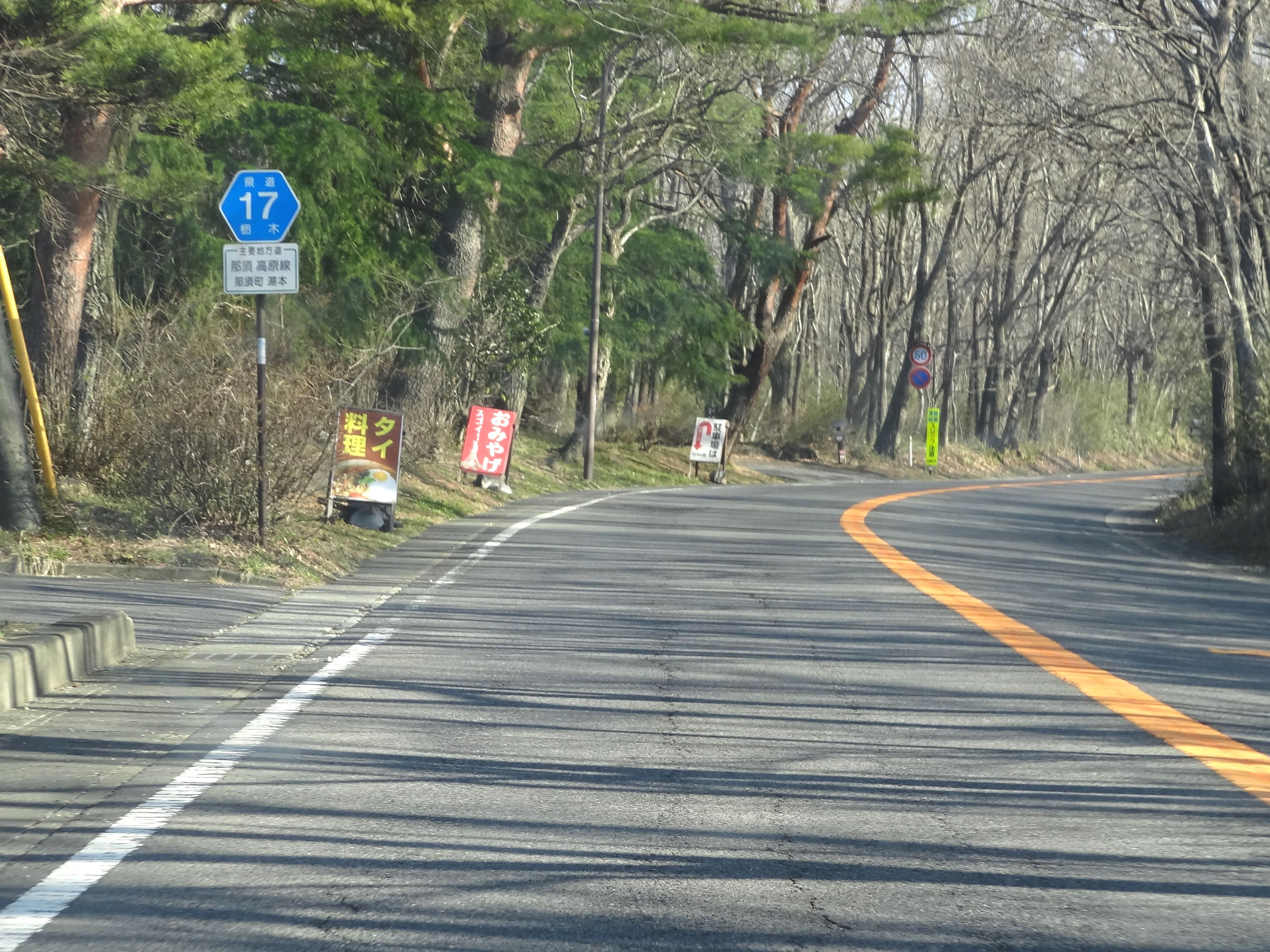 栃木県道17号那須高原線 那須郡那須町大字湯本付近